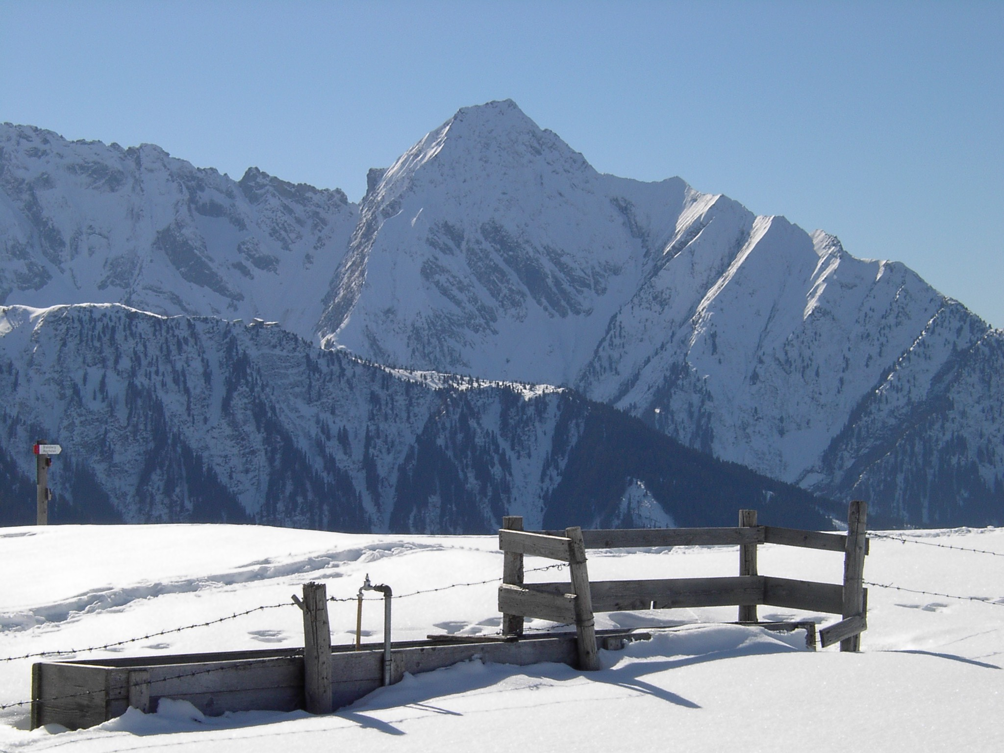 Blick vom Ahornplateau auf den Tristner.